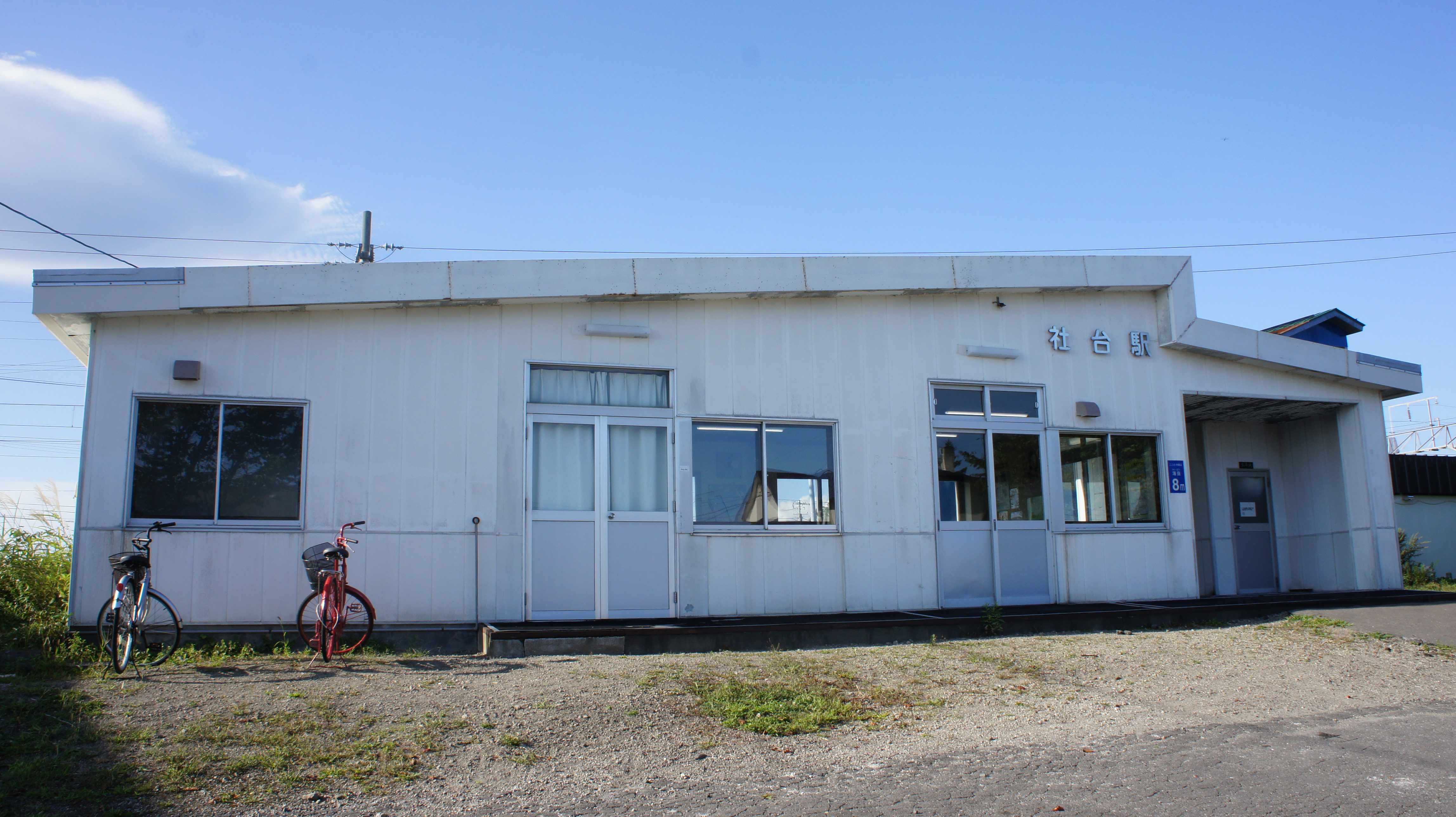 JR室蘭本線・社台駅の駅舎